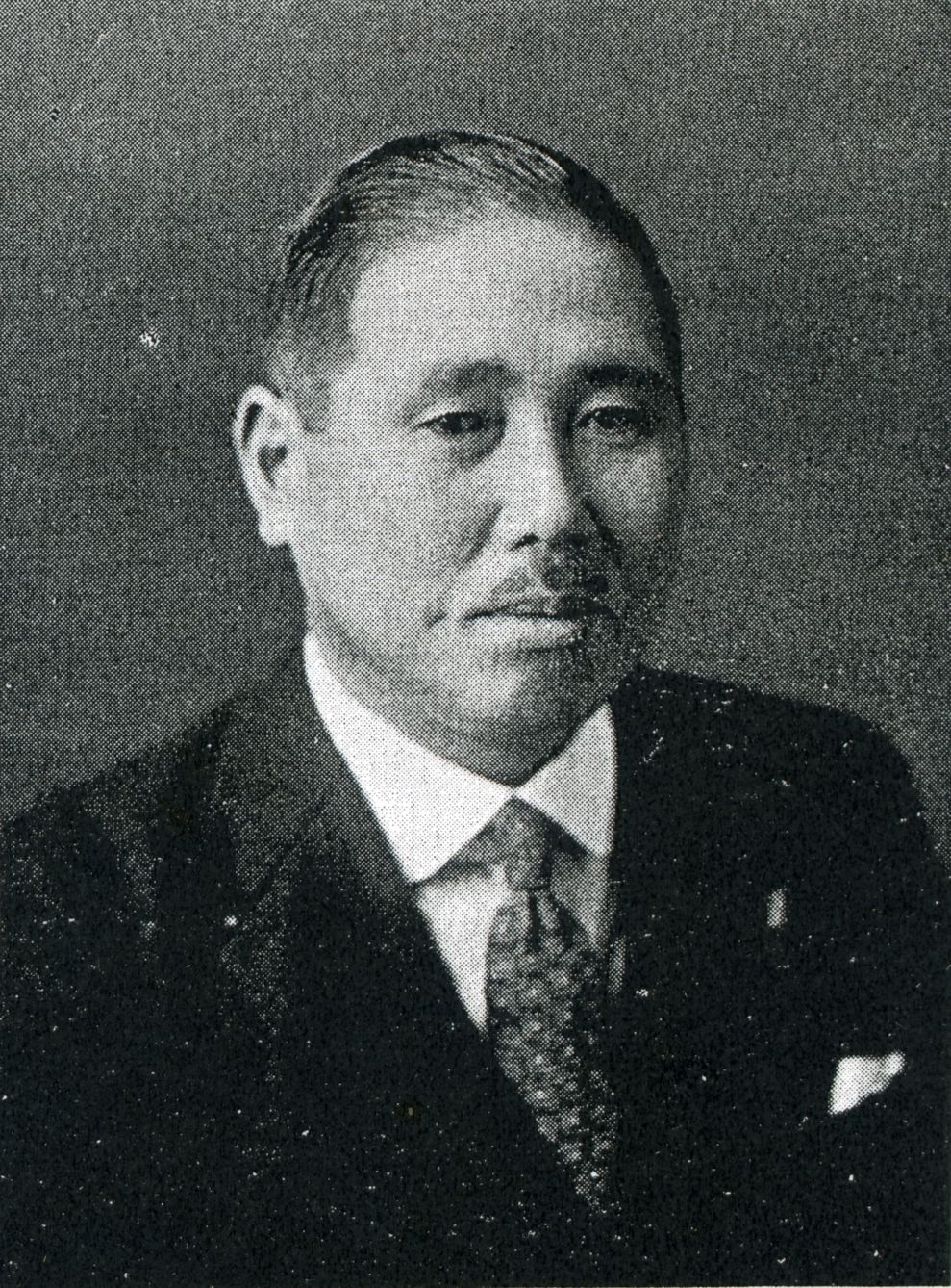 この写真は、山道襄一（1882-1941）の写真です。